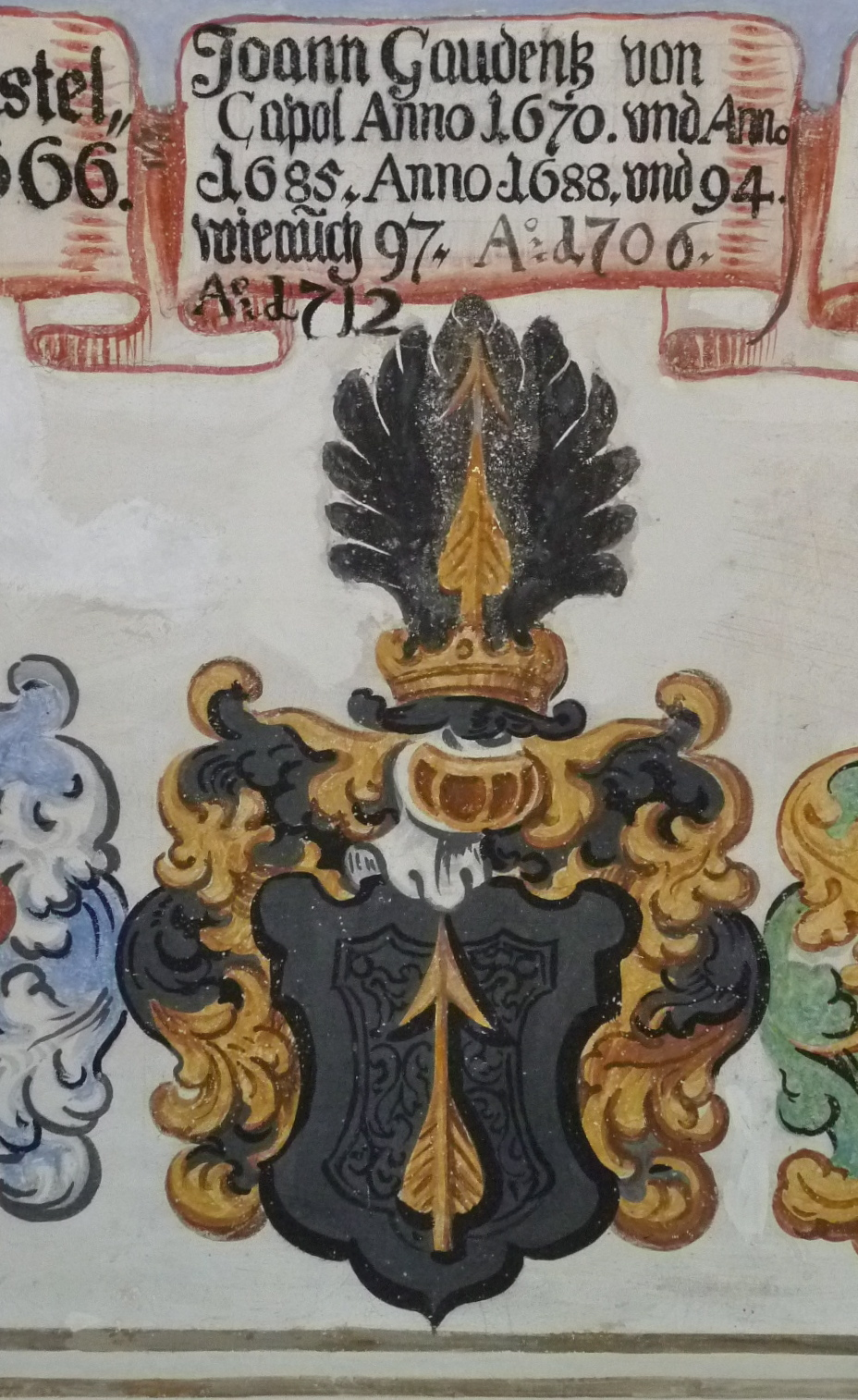 Cuort Ligia Grischa